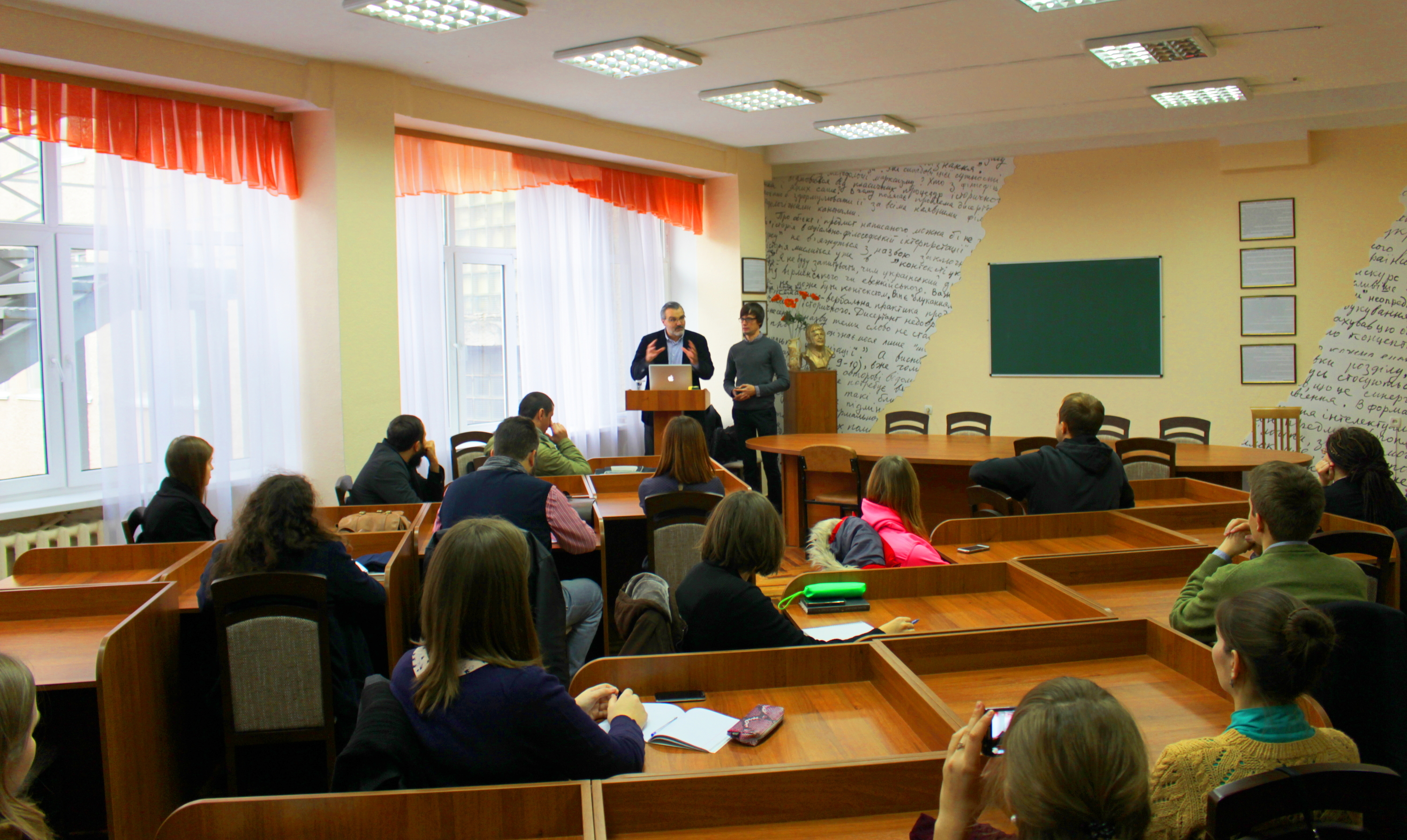 13 листопада 2015 року, о 12:30 на базі НПУ імені М.П. Драгоманова відбулась лекція на тему: "Православ'я та протестантизм. Діалог у посткомуністичній Македонії», яку читав Коста Мілков, доктор філософських наук (Оксфордський університет).